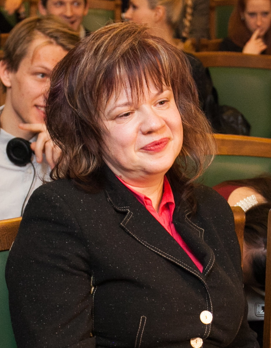 2013.gada 17.janvāris. Saeima, atklāti balsojot, par valsts kontrolieri ieceļ Elitu Krūmiņu